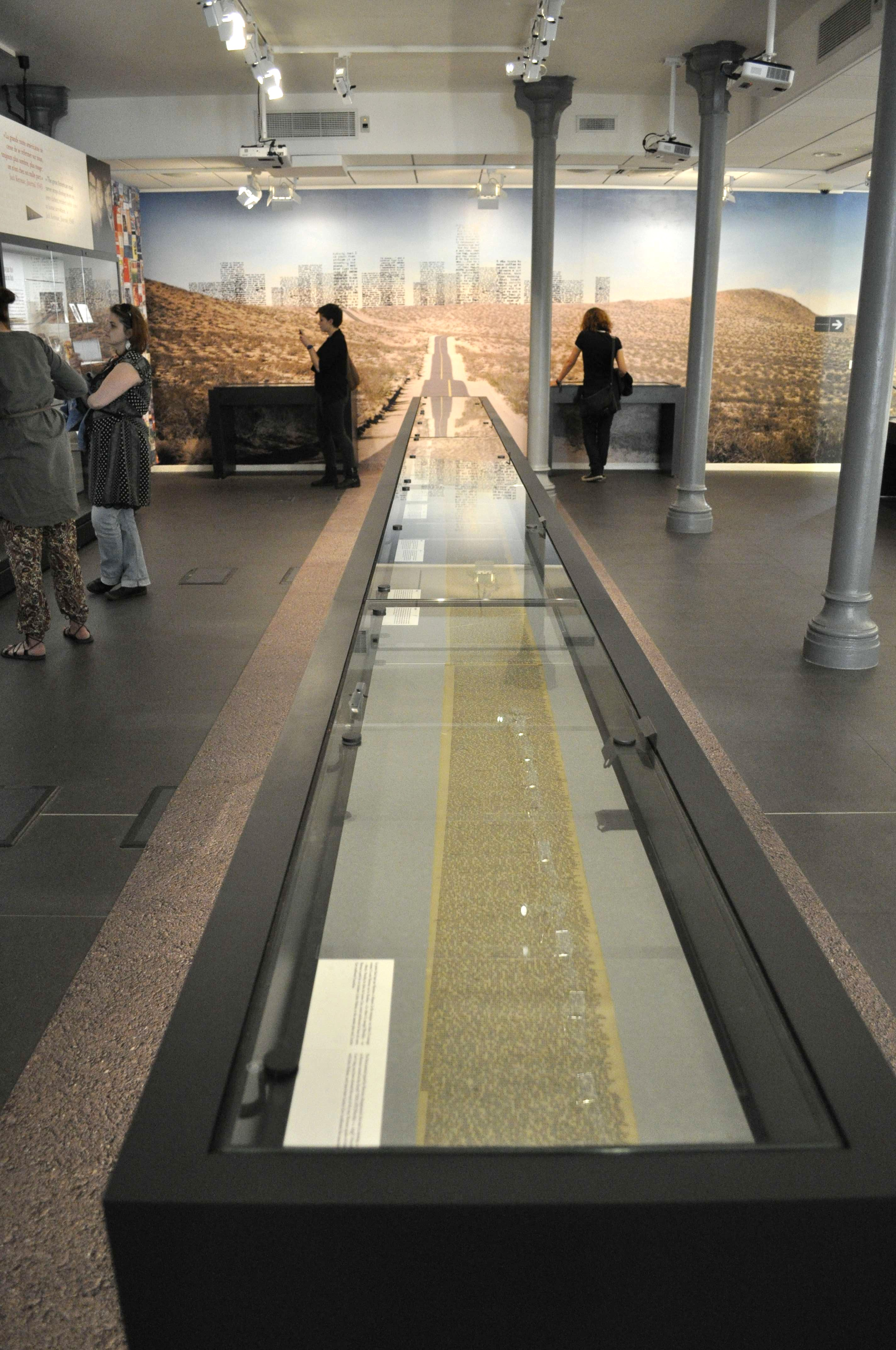 Le manuscrit de Sur la route par Jack Kerouac. Exposition "Sur la route deJack Kerouac : L'épopée, de l'écrit à l'écran" (16 mai - 19 août 2012) au Musée des lettres et manuscrits de Paris.